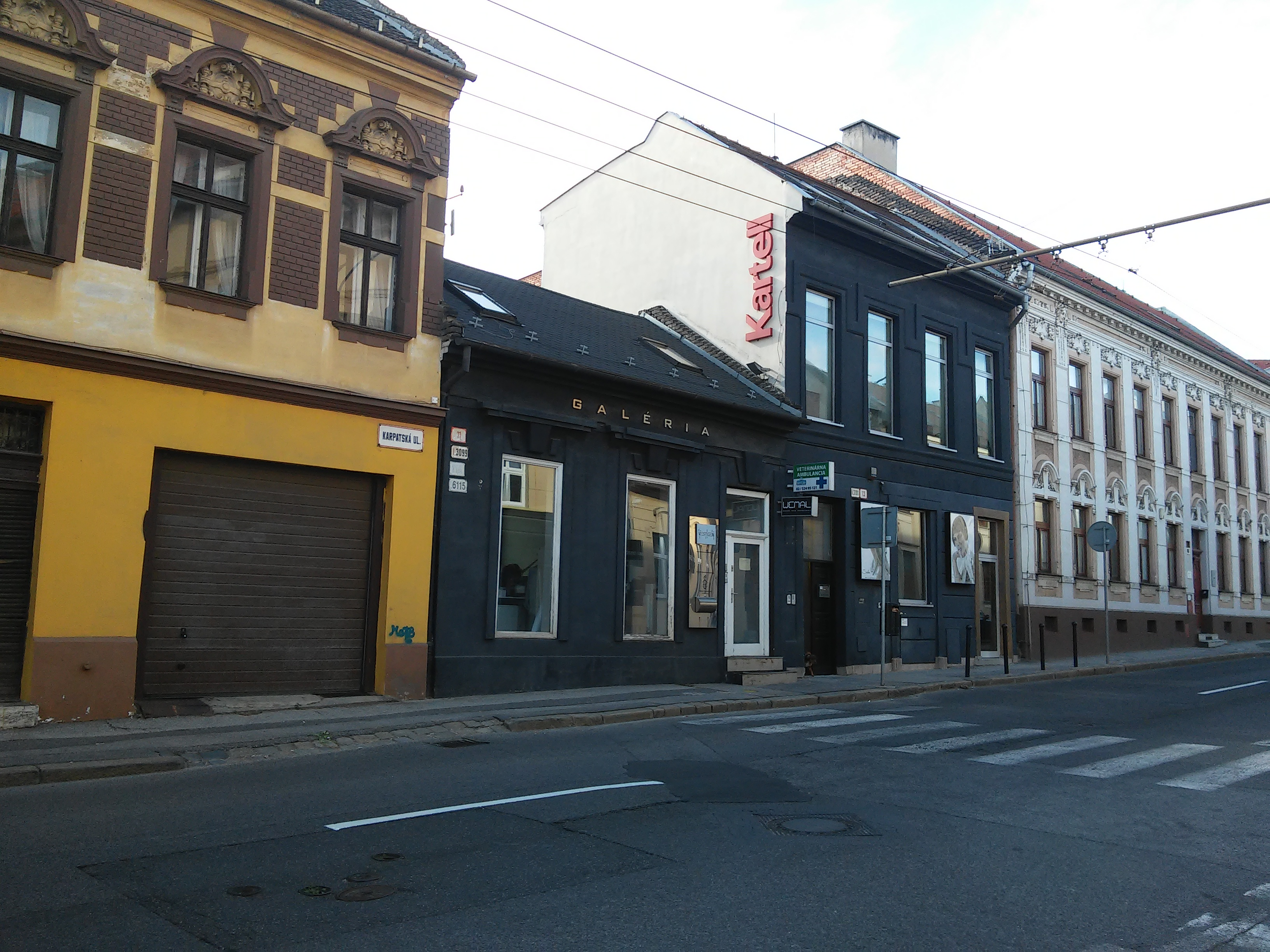 Vila K.F.A. na Karpatskej ulici v Bratislave